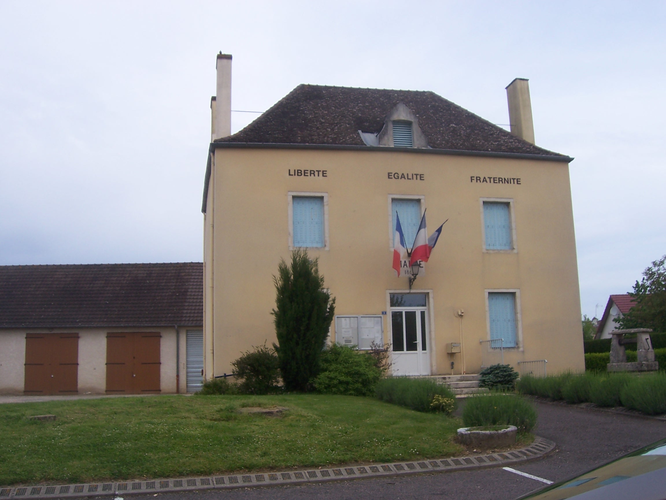 Mairie de Saint-Christophe-en-Bresse